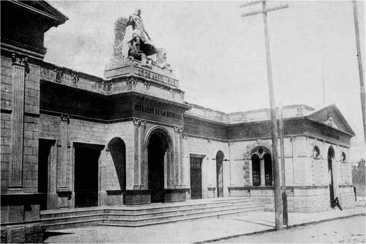 Corrección de Menores, Ciudad de Guatemala. 1910.